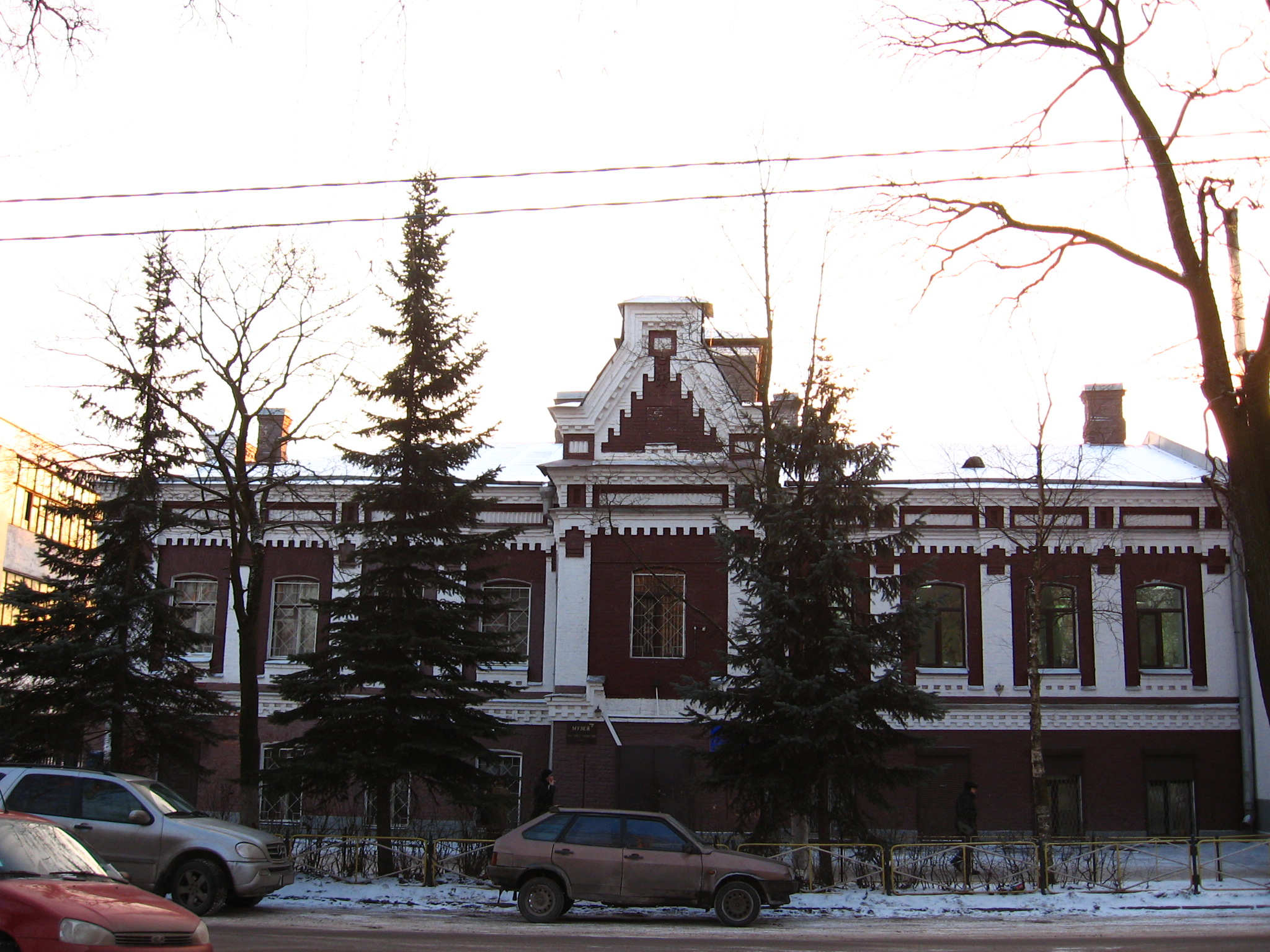 Музей завода "Буревестник". Гатчина, Соборная, д. 31